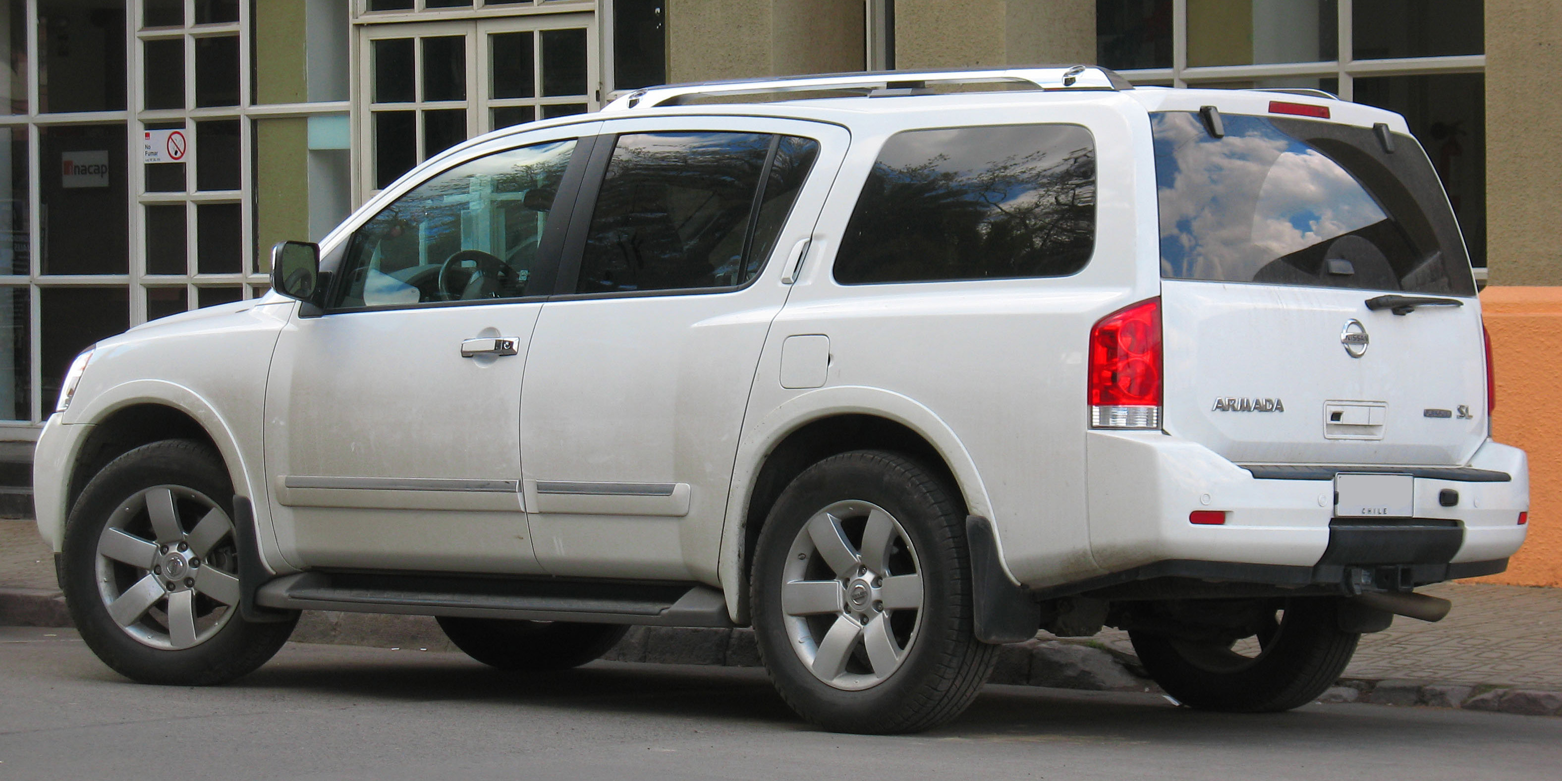 Nissan Armada SL 2011